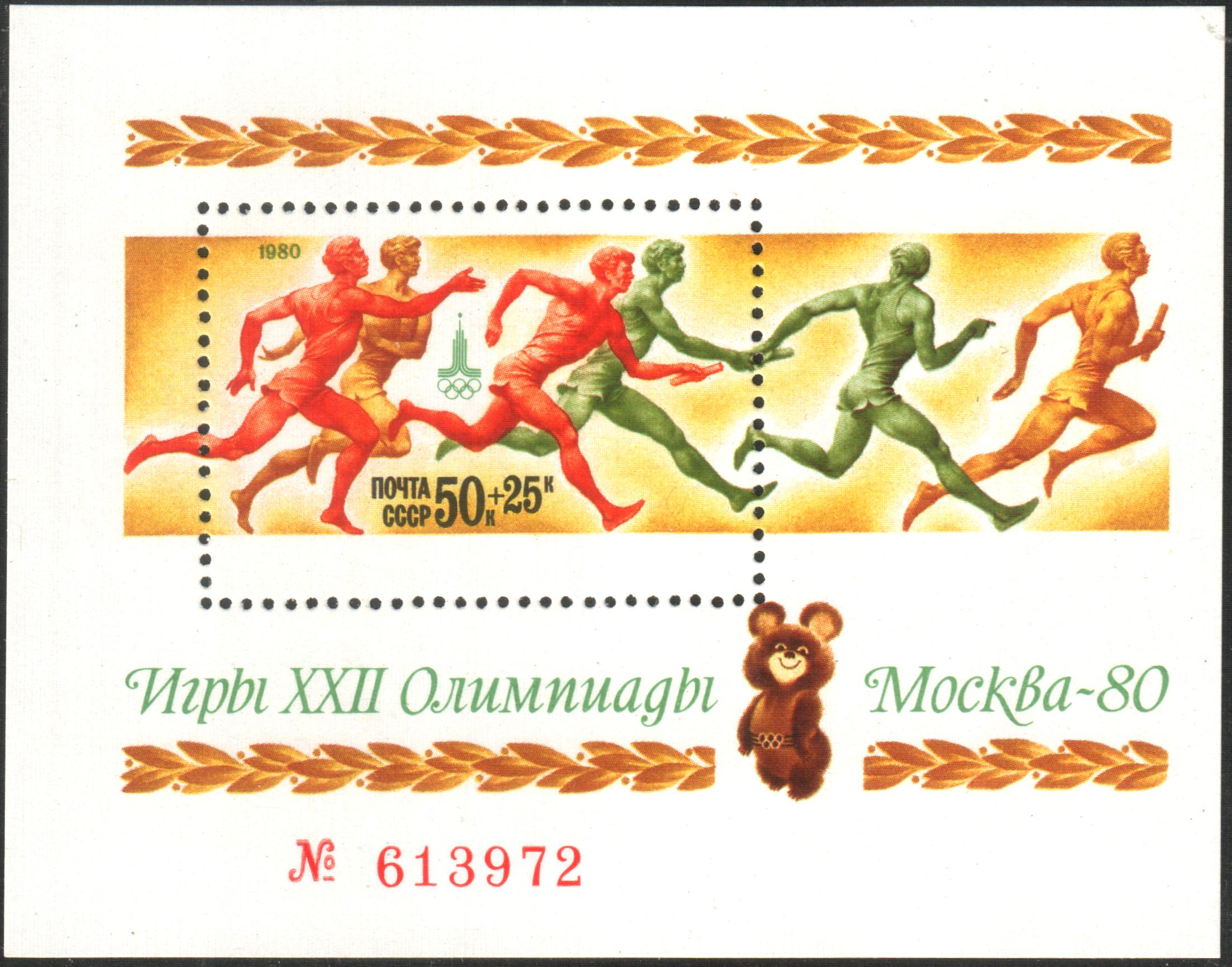 Почтовый блок СССР из серии «Игры XXII Олимпиады. Москва (19/VII—3/VIII). Легкая атлетика», выпущенный в 1980 году. На почтовом блоке изображены фигуры спортсменов, символизирующие эстафетный бег, эмблема Олимпиады, талисман Олимпиады — медвежонок. Художник — Н. Литвинов. Номер — 5049 (ЦФА). Тираж — 700 тыс. экз. Описание — по изданию «Почтовые марки СССР 1980: Каталог», М., Радио и связь, 1981.